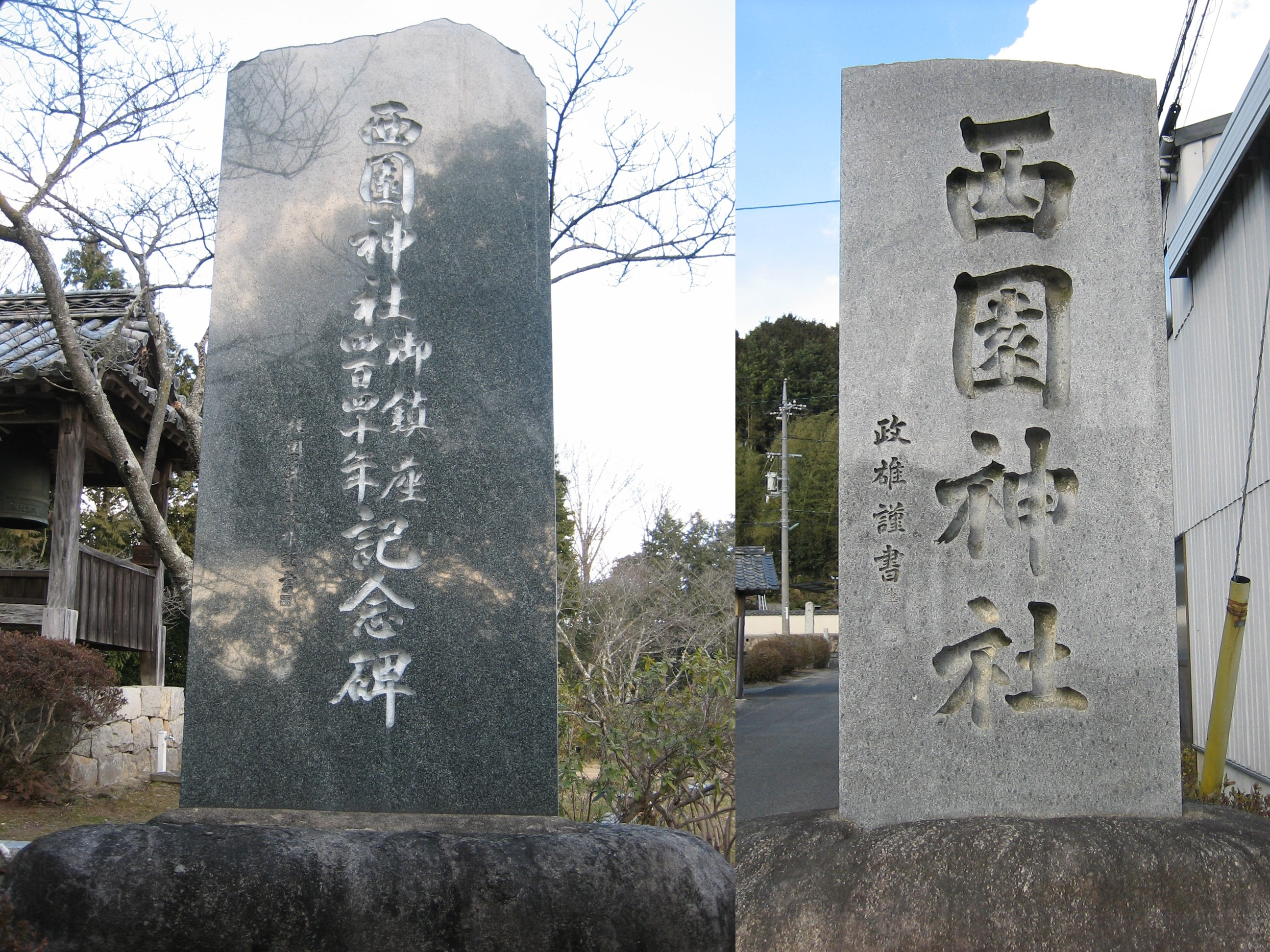 Nj-syohi